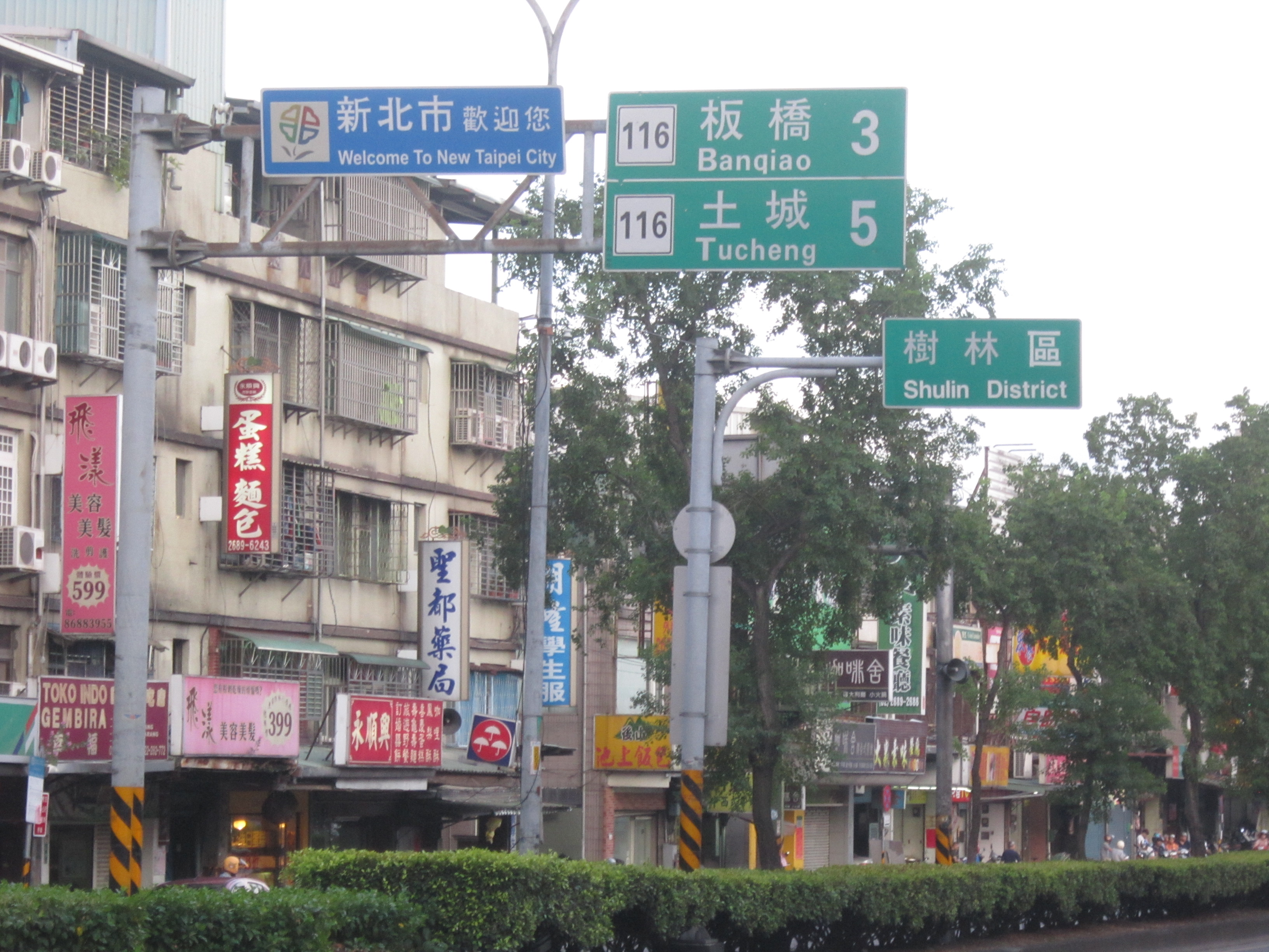 市道116號在迴龍的起點，龜山區萬壽路與樹林區中正路交叉口，此恰好為新北市與桃園市交界處。